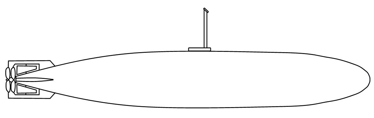 Japanisches Kleinst-U-Boot "Shin Kai"